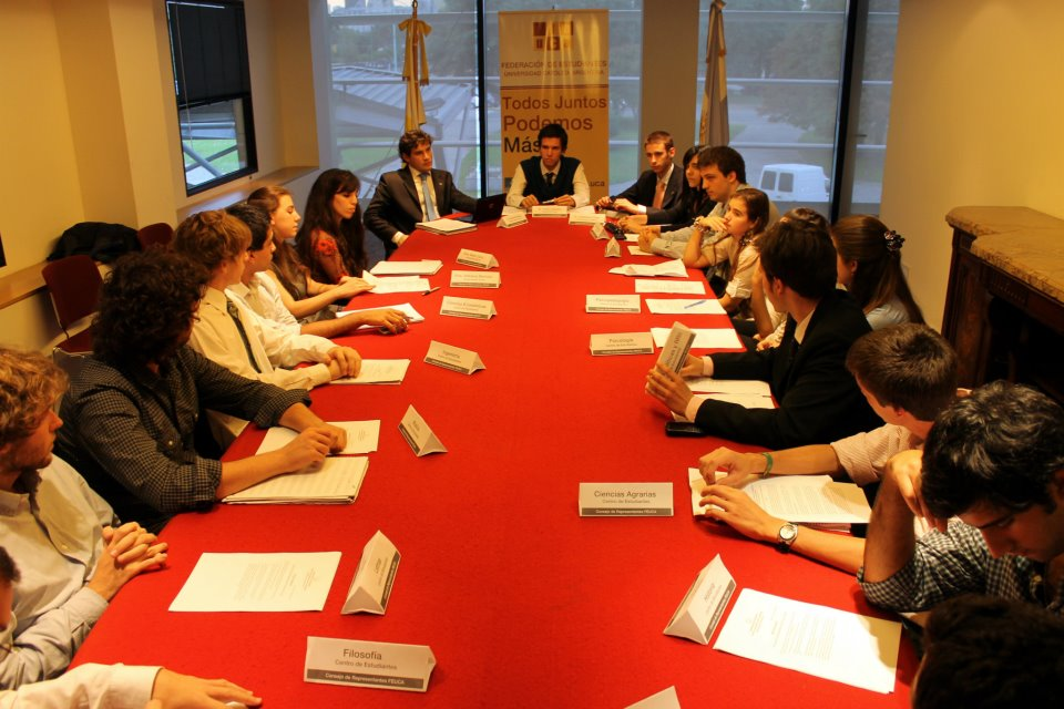 Reunion Consejo de Representantes